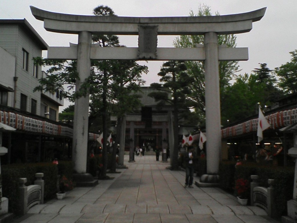 茨城県笠間市「笠間稲荷神社」石鳥居